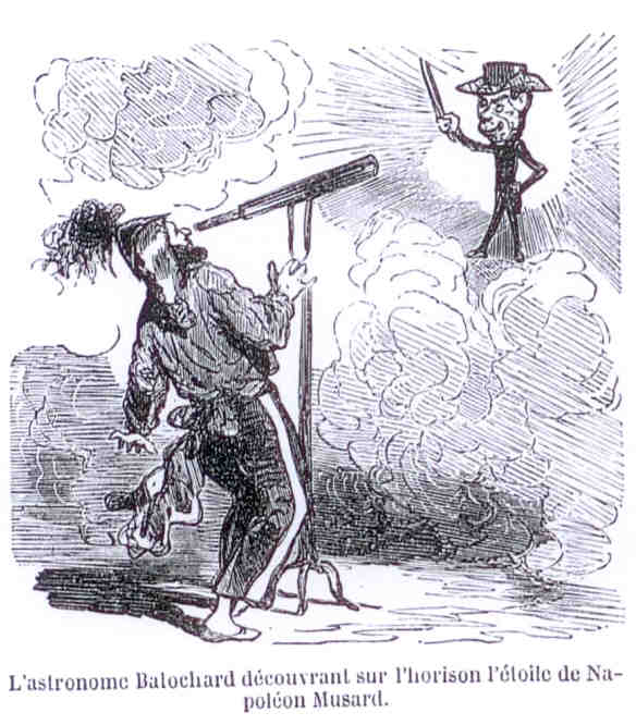 L'astronome Balochard découvre l'étoile de Napoléon Musard (Philippe Musard, le Napoléon du quadrille).